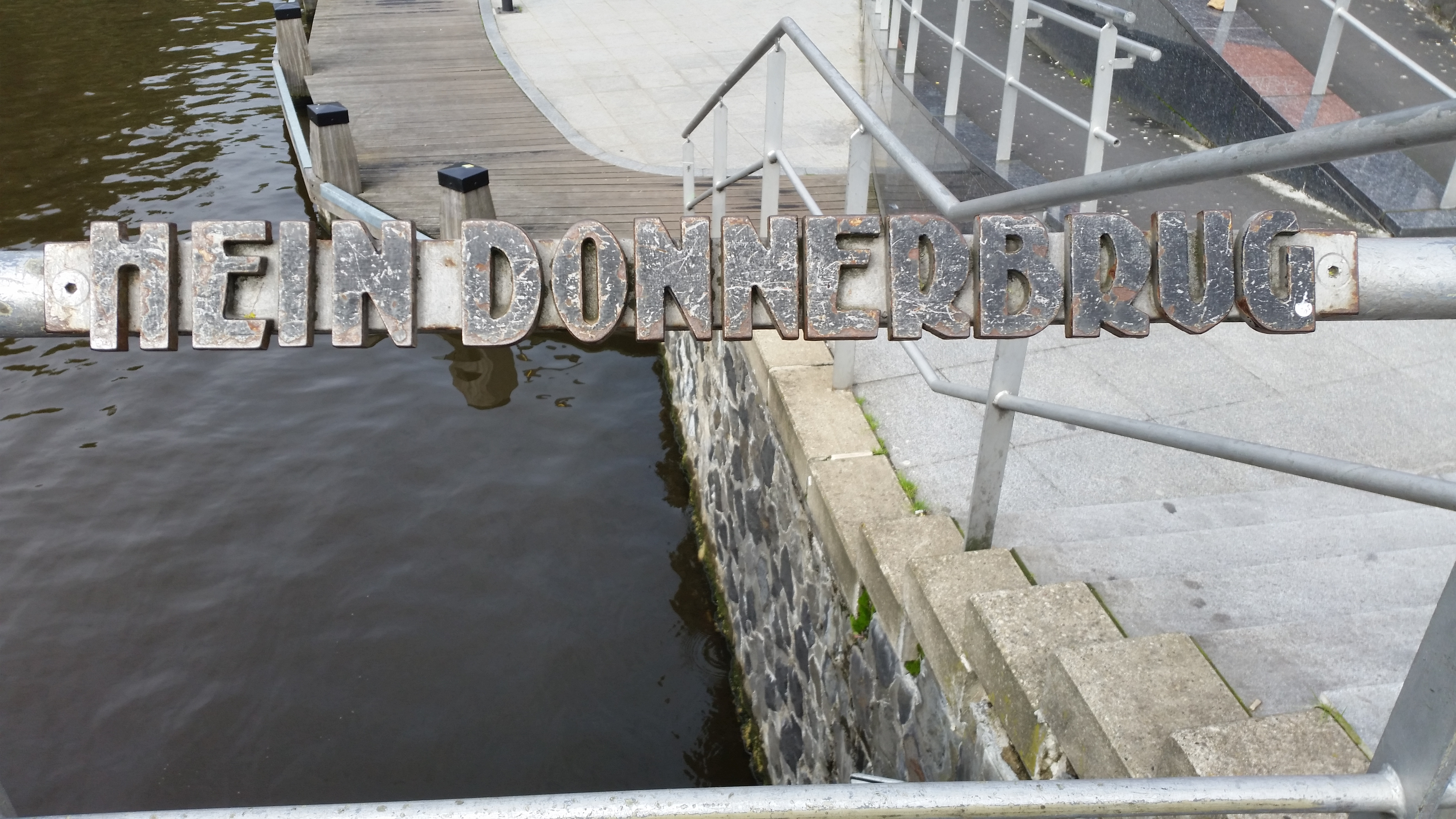 Brug 1922, Hein Donnerbrug